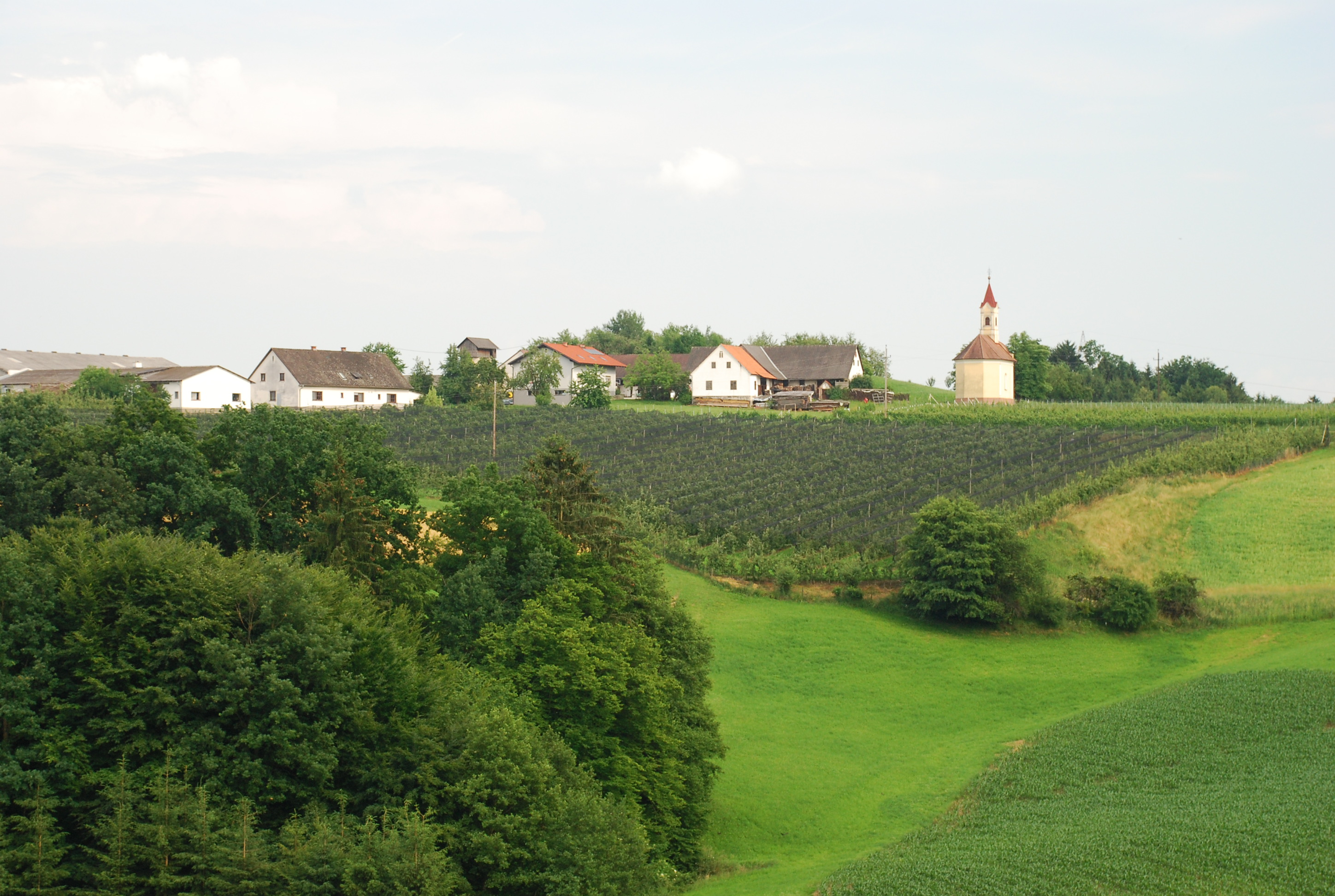 Landschaft (Schotterriedel) im Einzugsgebiet der Laßnitz